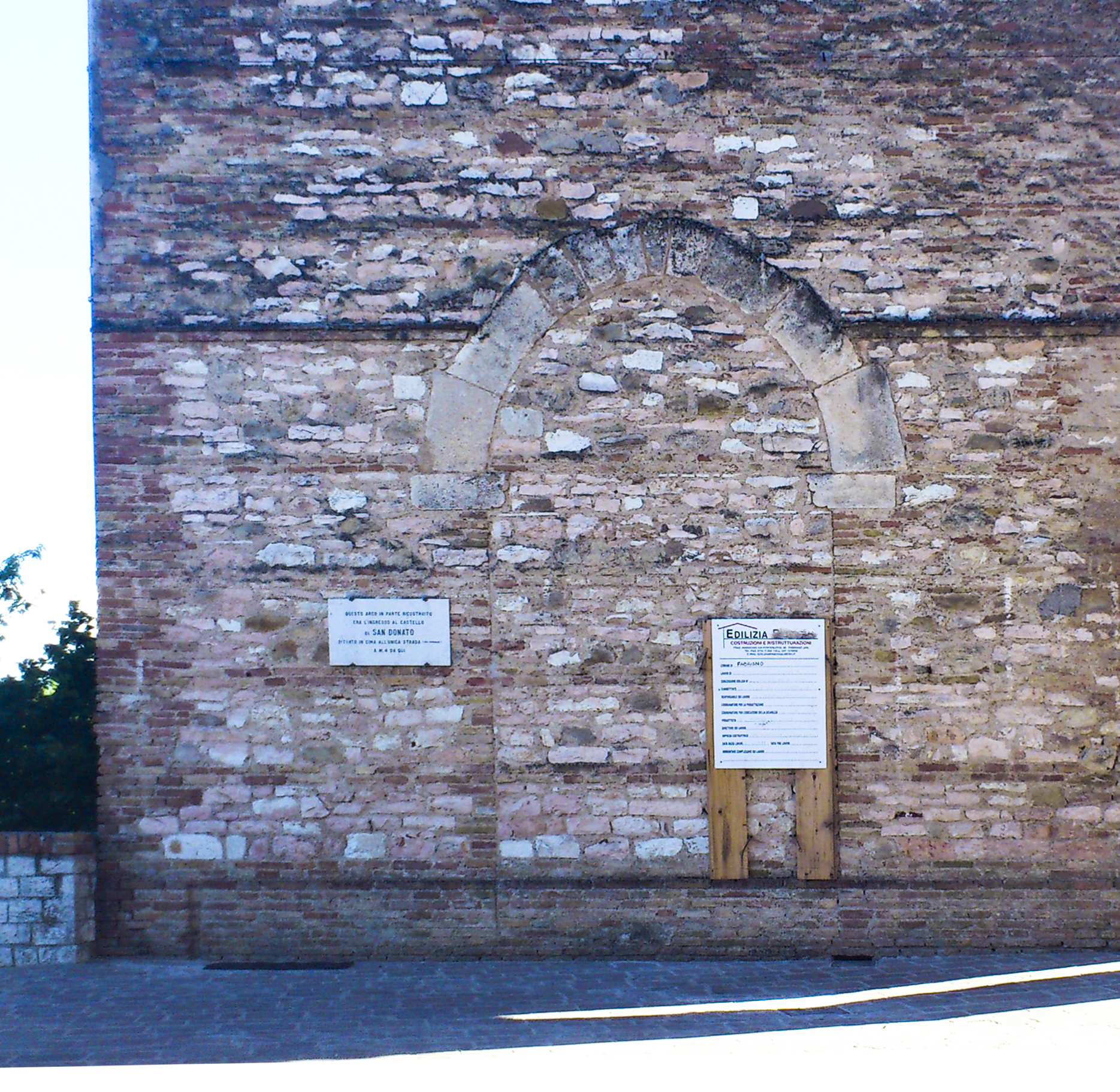 Les vestiges de la porte de la "rocca" ont été incorporés au mur d'un édifice à proximité de son ancien emplacement.